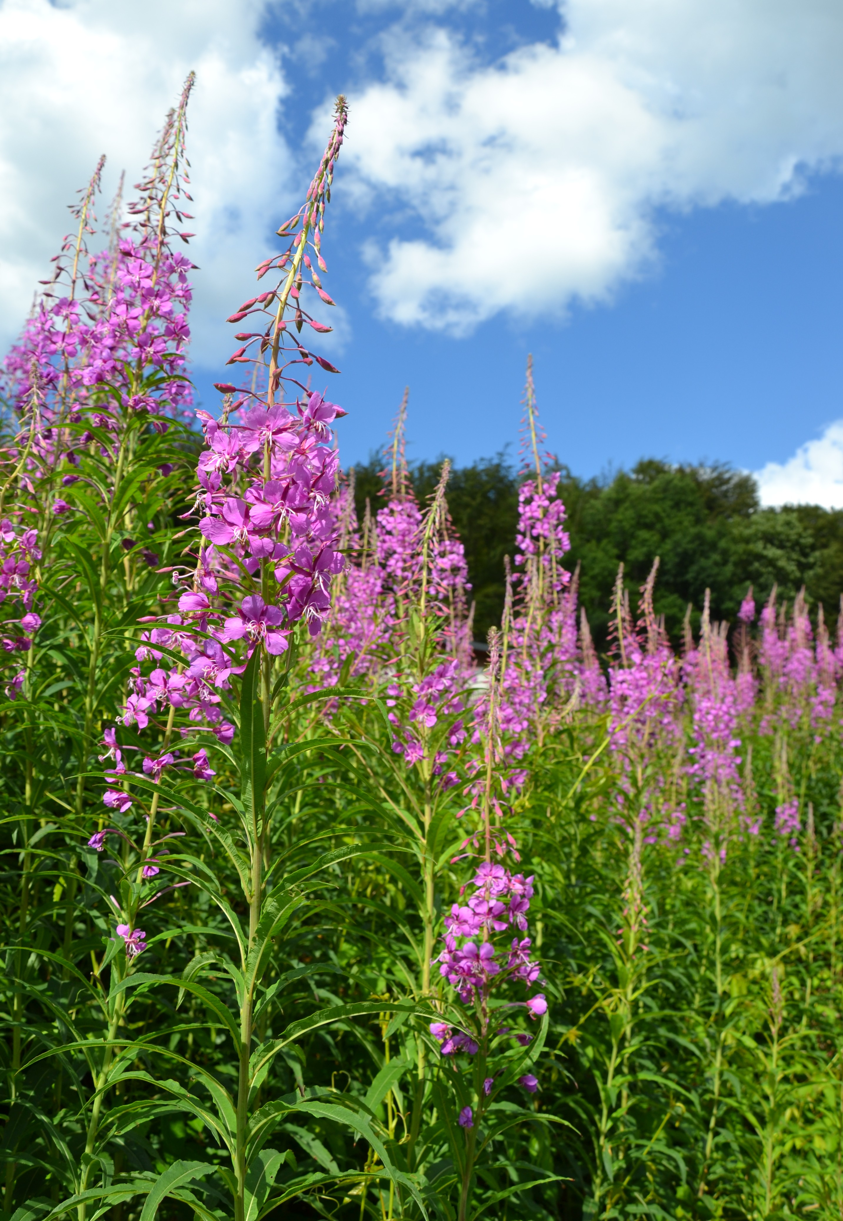 Épilobe en épi (Chamerion angustifolium), Le Tholy, Vosges.